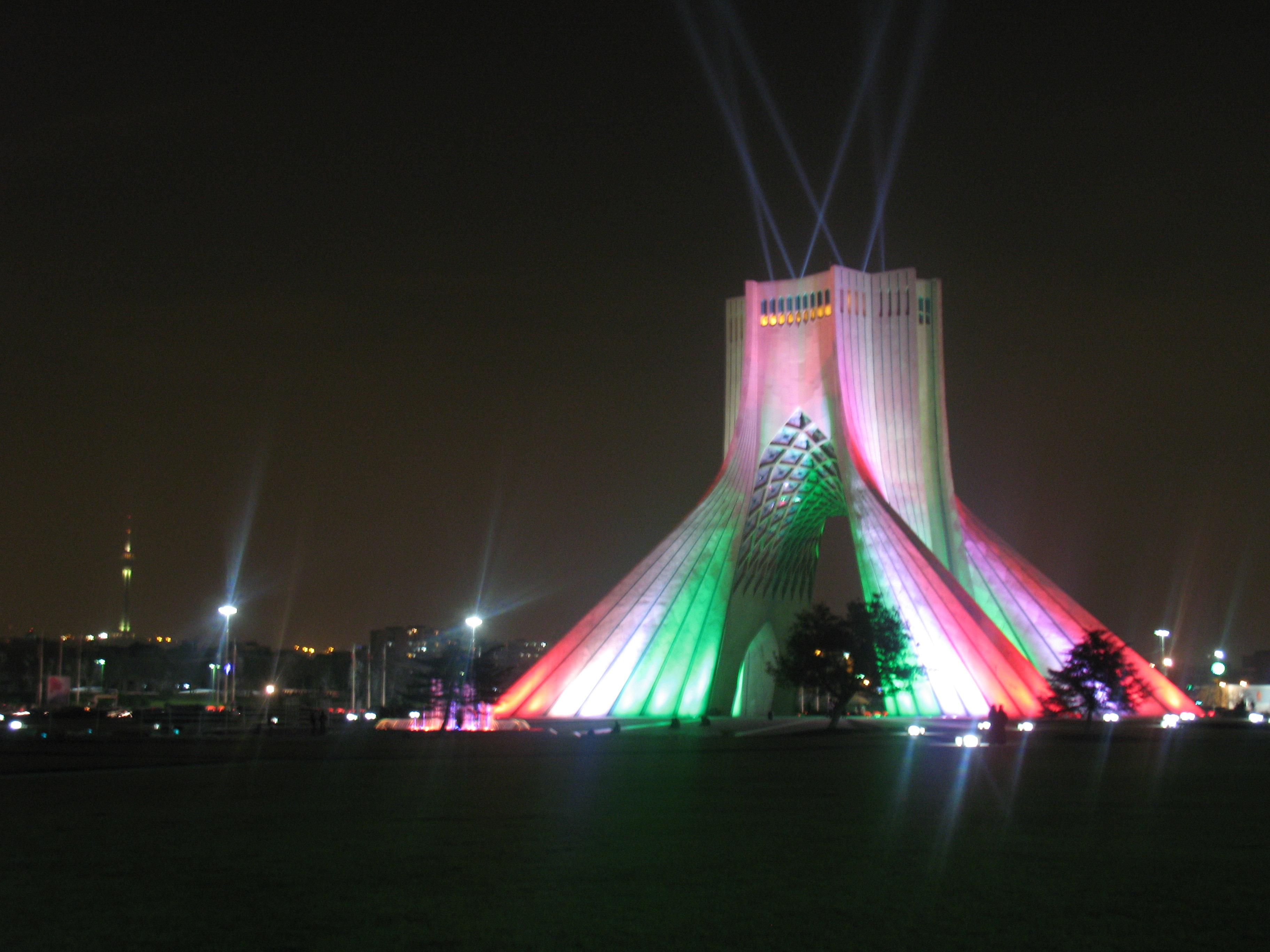 Milaad & Azadi tower, Meydan-e Azadi, Meydan-e Shahyad میلادوآزادی درجشن بهمن87